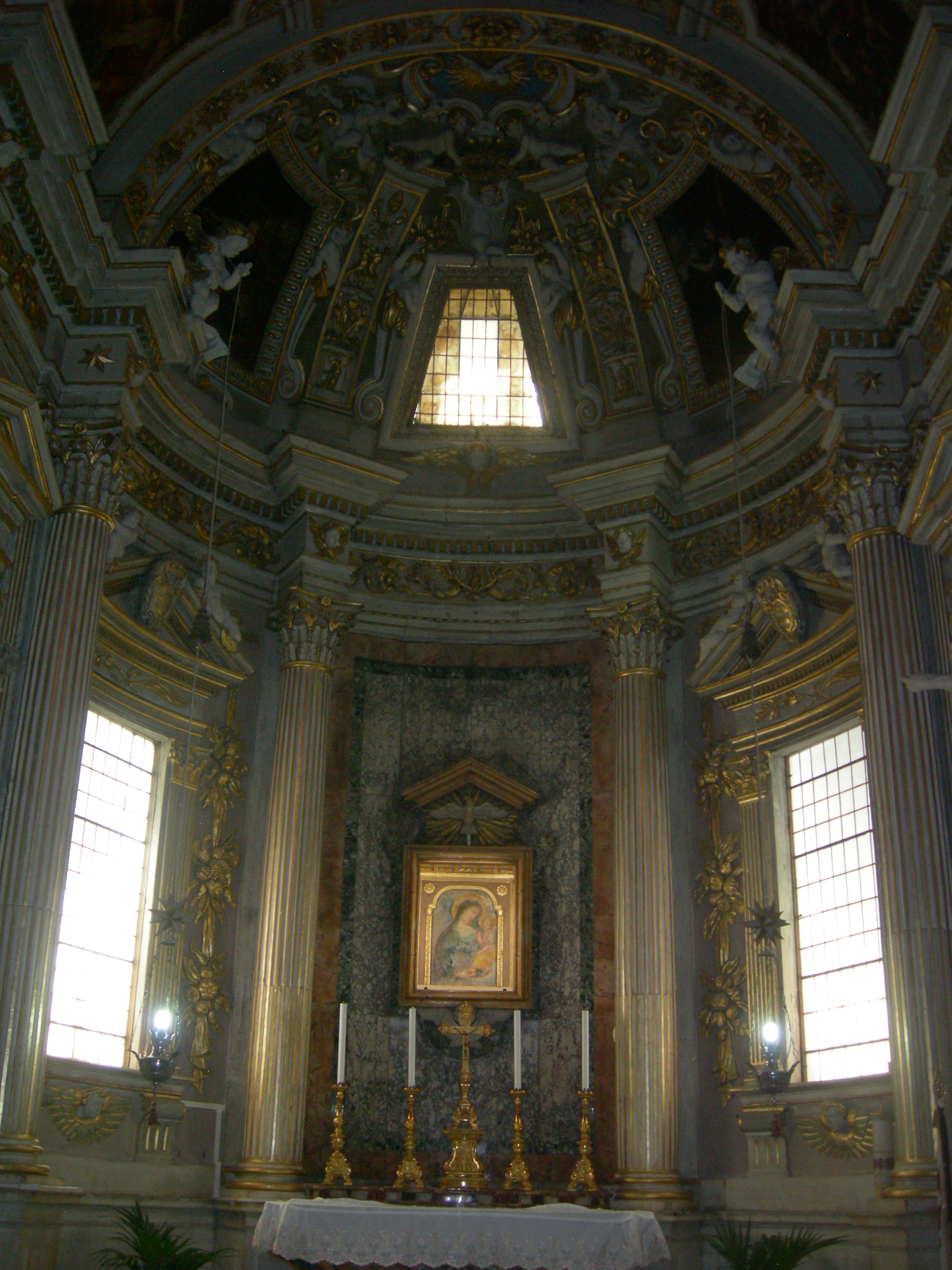 Cappella della Concezione nel Duomo di Urbino, Italia.